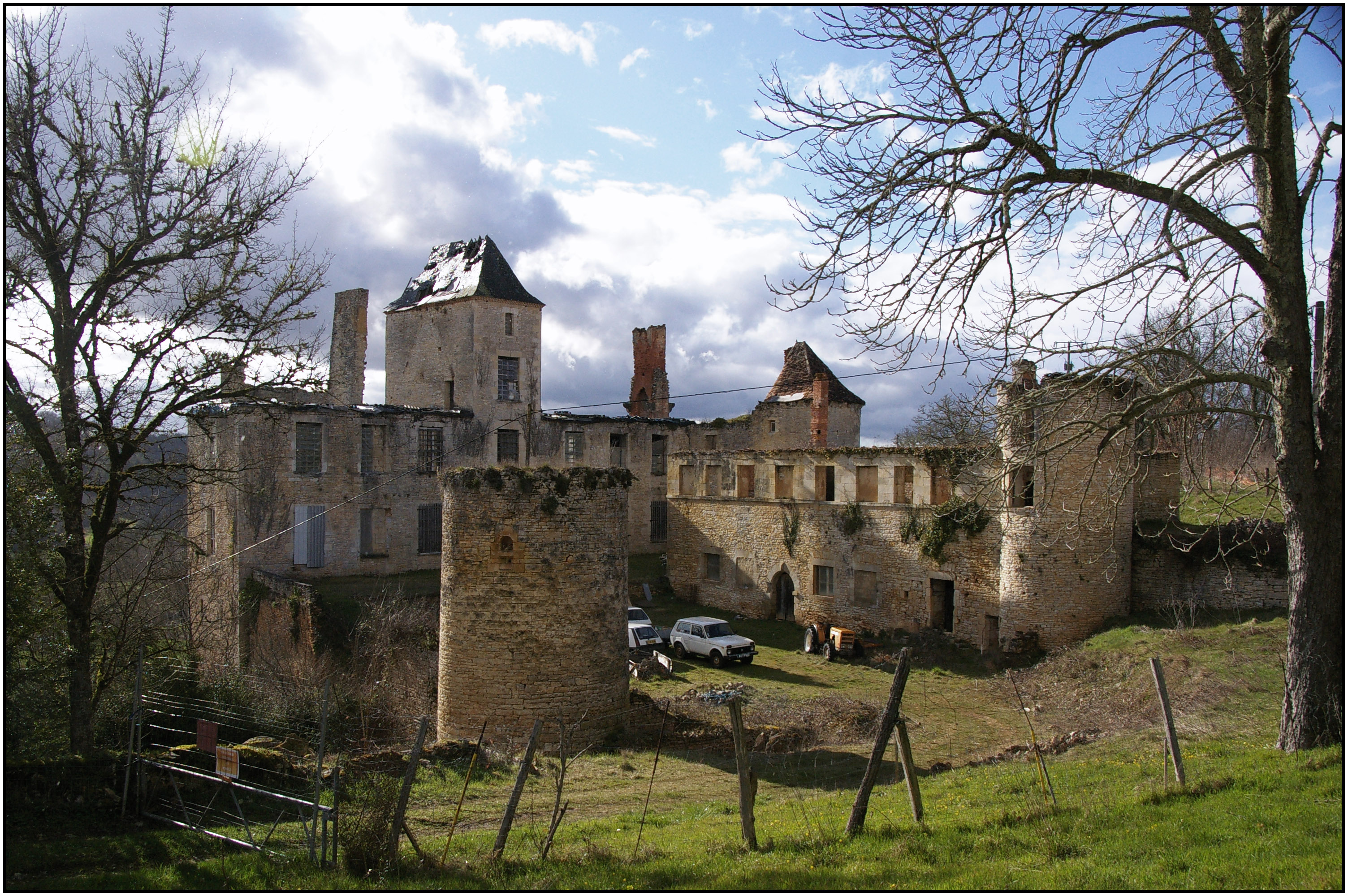 Château du Repaire, Saint-Aubin-de-Nabirat.